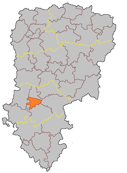 Кантон Суассон-Юг на карте департамента Эна